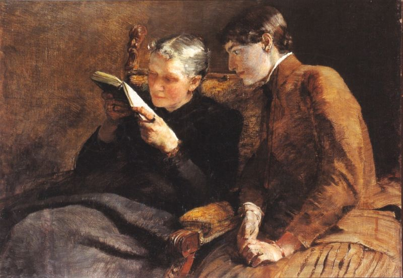 Clara von Rappard: Die Lesenden, 1886